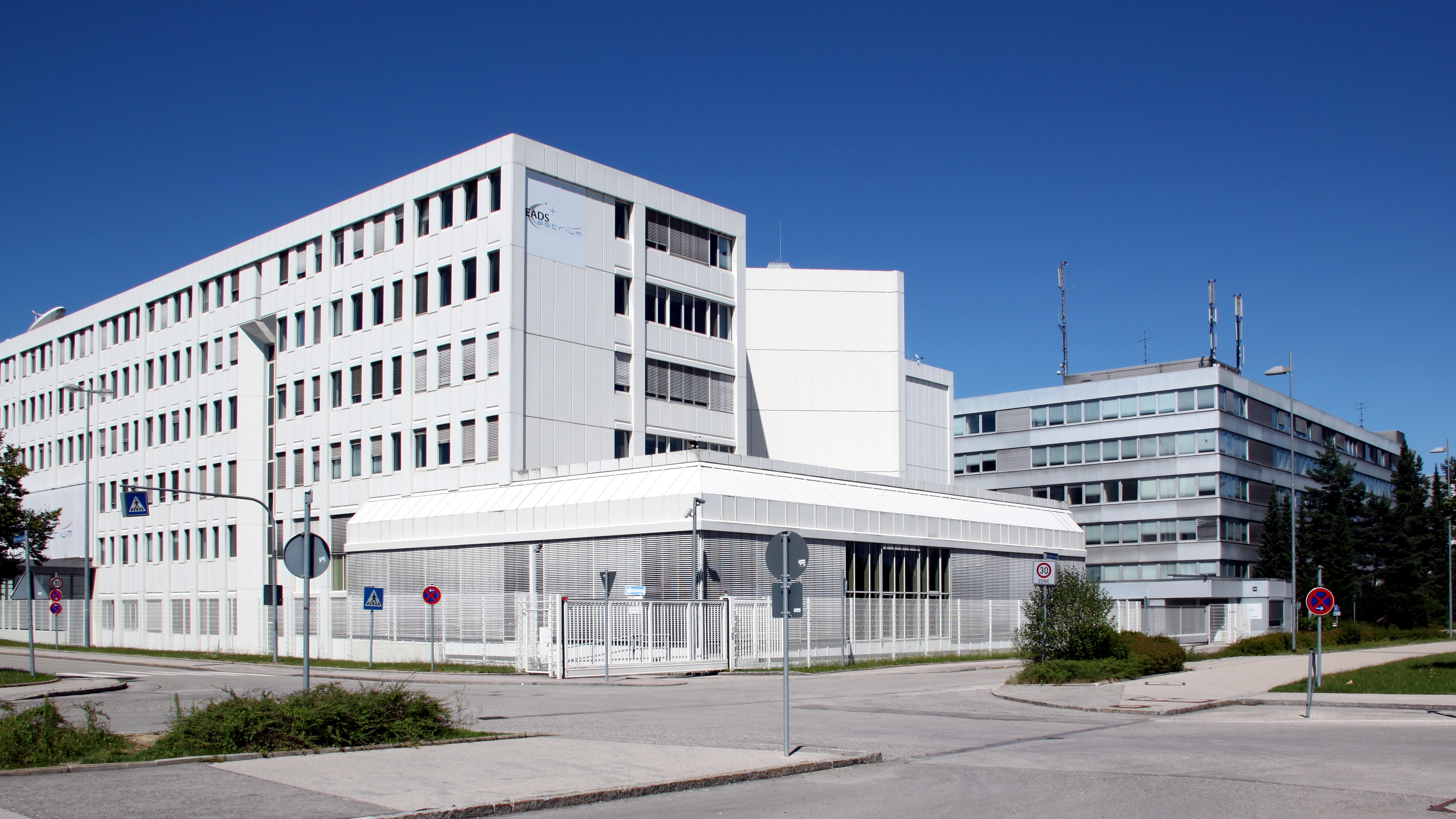 Taufkirchen: EADS Astrium